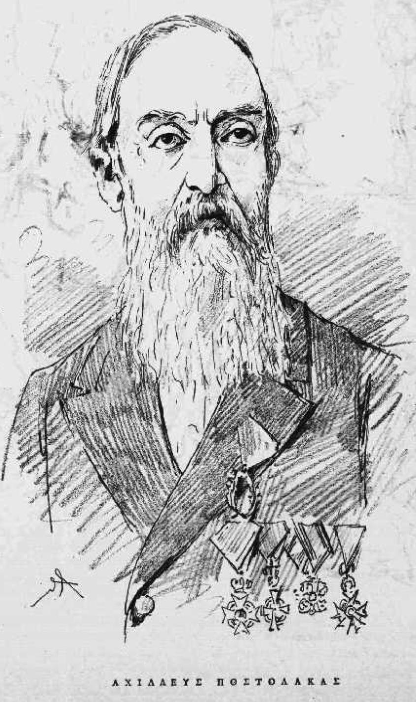 griechischer Numismatiker, 19. Jahrhundert